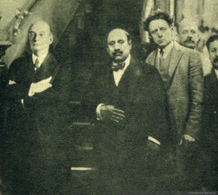 Foto del presidente argentino Marcelo Alvear con Banito Rebolledo, en 1923.